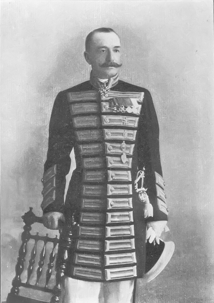 Александр Дмитриевич Протопопов в придворном мундире.